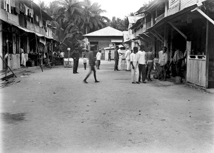 Negatief. Op 3 september komt de Gouvernementsstomer Edi, met op sleeptouw het Marineschip Arend, aan in Dobo op de Aroe-eilanden. Botanist Pulle schrijft in zijn expeditieverslag van de Derde Zuid-Nieuw-Guinea Expeditie van 1912-1913 hierover: "Het plaatsje Dobo, waar weer kolen moeten ingenomen worden, behoort tot de meest beruchte "negorijen" van den Archipel. .... Het is bijna geheel bewoond door Japanners, die van de parelvisscherij leven, terwijl het ook een zekere bekendheid heeft door den uitvoer van paradijsvogelhuiden. De plaats ligt op op een zandige landtong, die veel te weinig ruimte biedt voor het vrij groote aantal huizen, welke laatsten dan ook op elkaar gepakt staan als in een groote stad. Niemand heeft er spijt van, dat we den volgenden dag weer moeten vertrekken". Ook G.M. Versteeg wijdt enkele regels aan het plaatsje in zijn ongepubliceerde verslag: ".......Reeds vroeger waren de Edi bewoners aan wal gegaan. Zij hebben een tocht naar de vuurtoren gemaakt, 5/4 uur van Dobo (gemaakt) en kwamen pas om een uur of 12 terug. Dobo is wat uitgebouwd, het ligt op een koraalpunt met strand; achter de kampong ligt Bako bako. - Dobo is zelfs een petroleum verlichting rijk, 't was haast als uitgestorven, vnl. Chineezen en Japanners wonen hier, waarvan de laatste zich met parelvisscherij op de Oostkant van de Aroe-eilanden bezighouden".. Straatgezicht te Dobo, Aru-eilanden